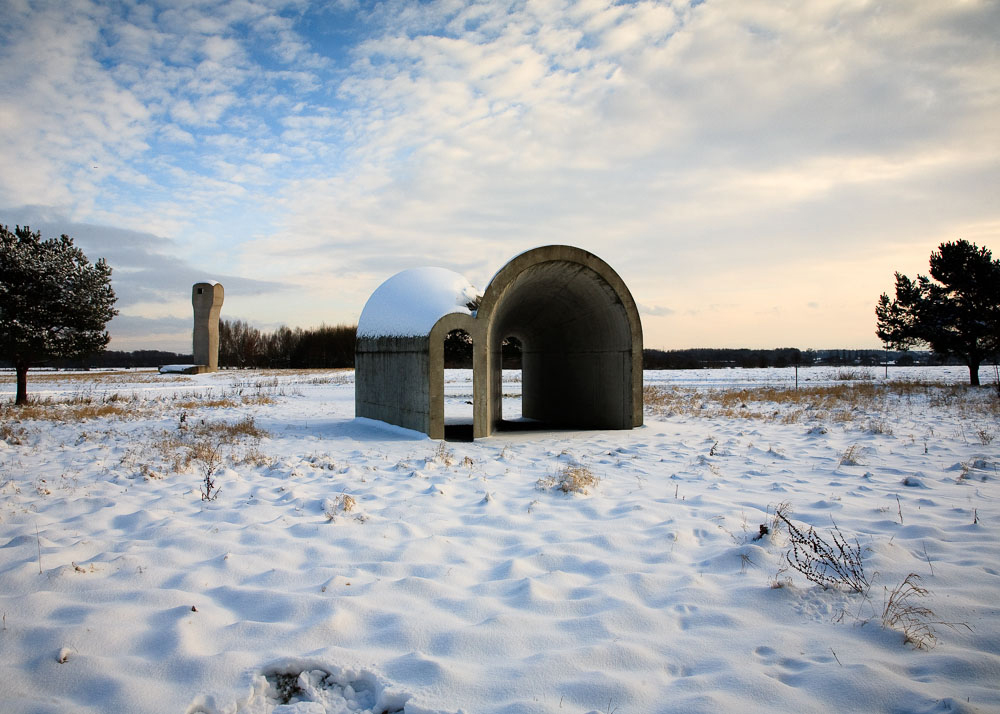 Heinz Baumueller: Eingang/Ausgang, 1998 Insel Hombroich/Raketenstation Beton / concrete (80 t), 528 x 528 x 432 cm